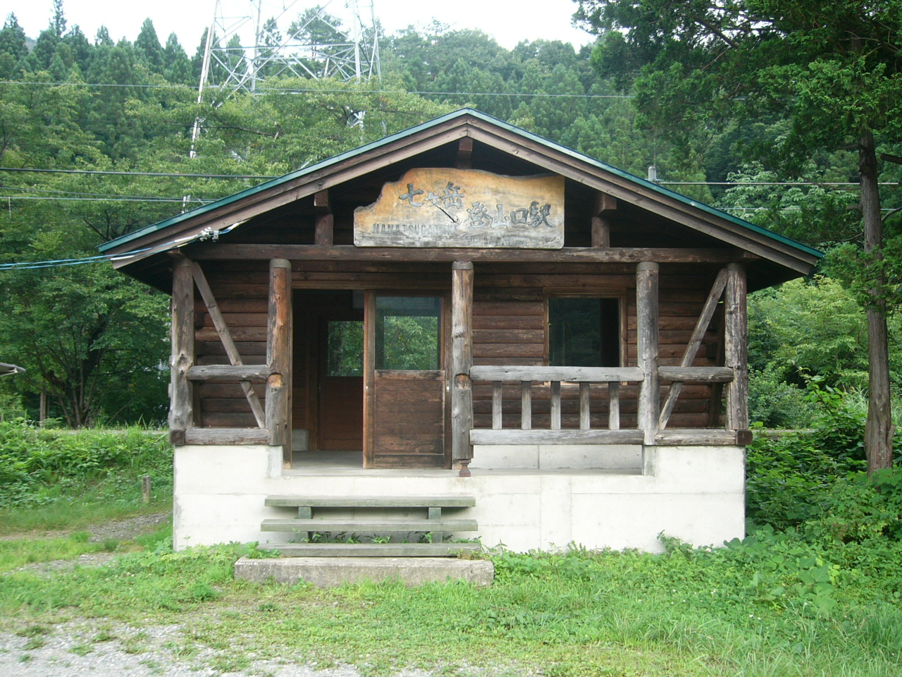 Nanatsugataketozanguchi Station